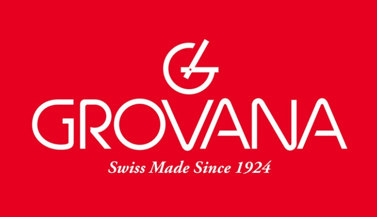 Logo der Grovana Uhrenfabrik AG, Tenniken, Schweiz